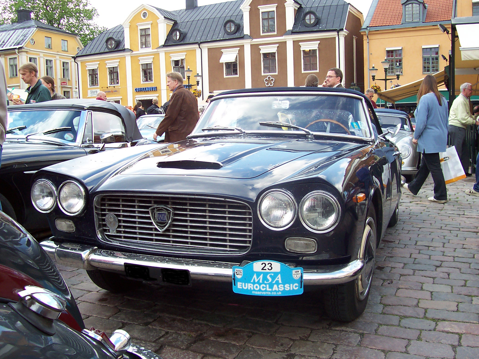 Lancia Flaminia GTC.